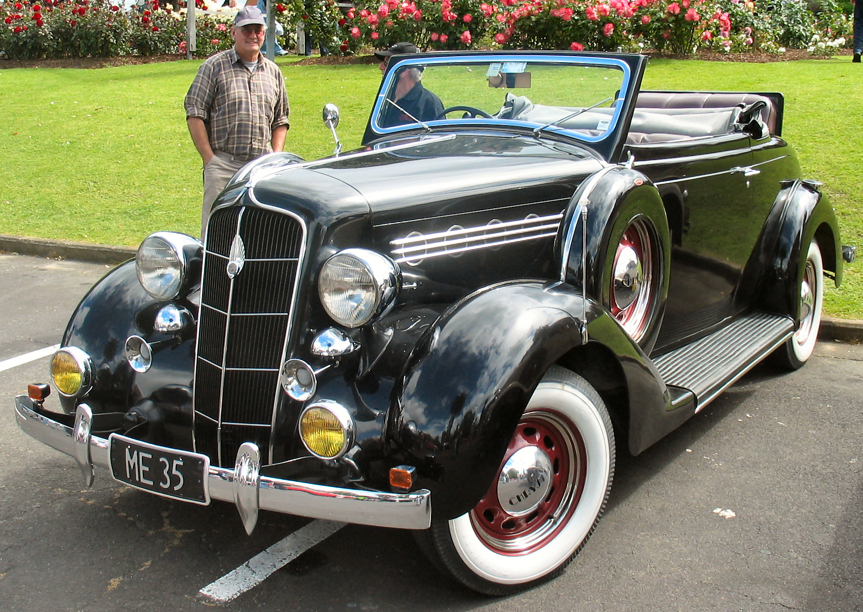 1935 Chrysler Deluxe, in Auckland, New Zealand.